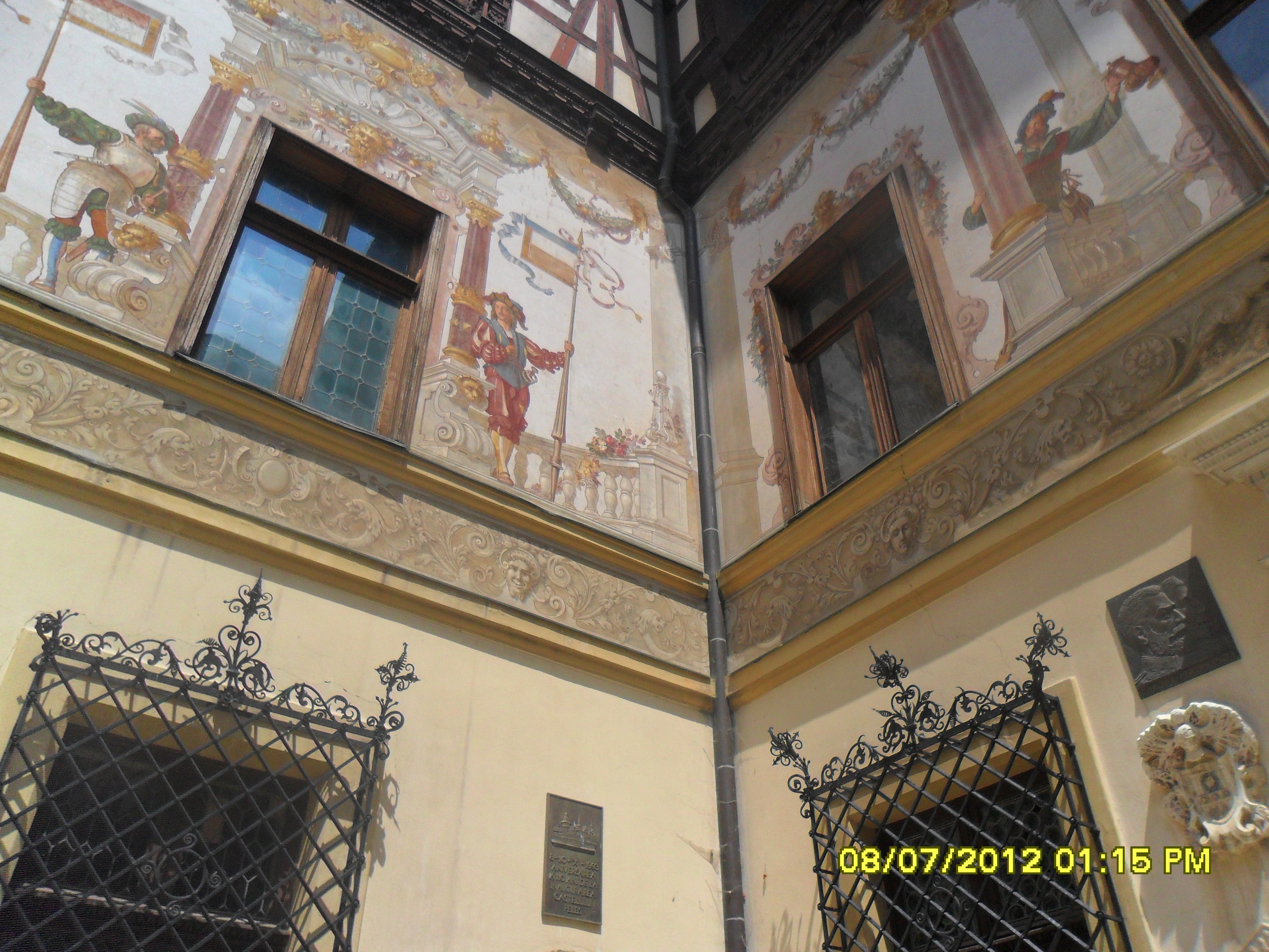 Dziedziniec zamkowy